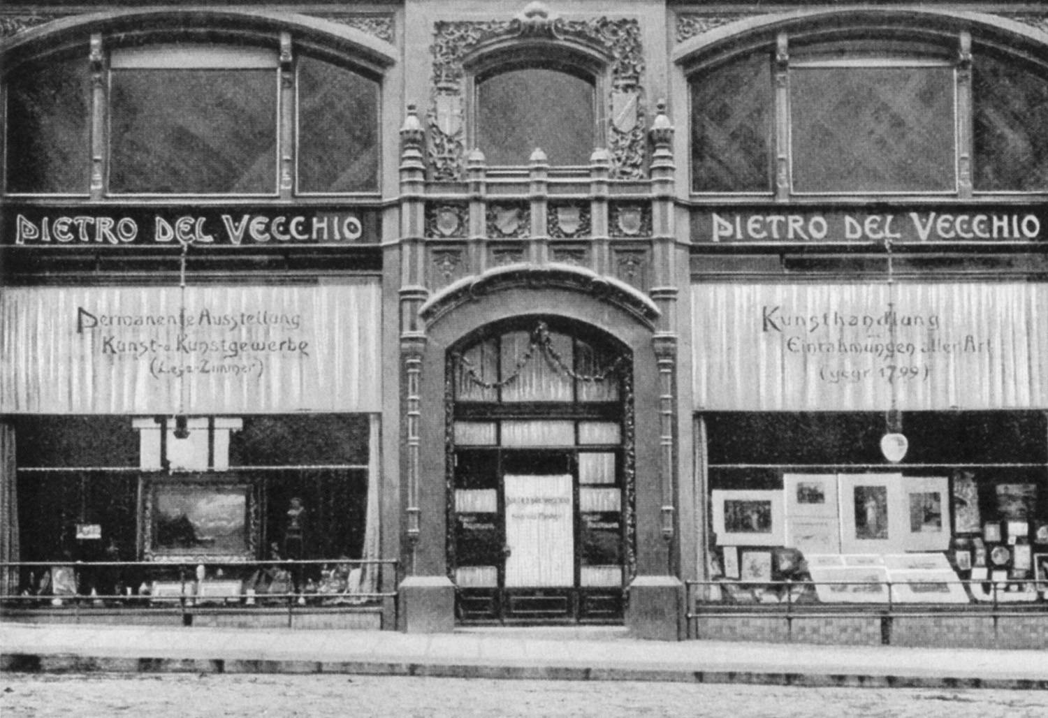 Die Kunsthandlung Del Vecchio in Leipzig, Markgrafenstr. (nahe Burgplatz), 1900